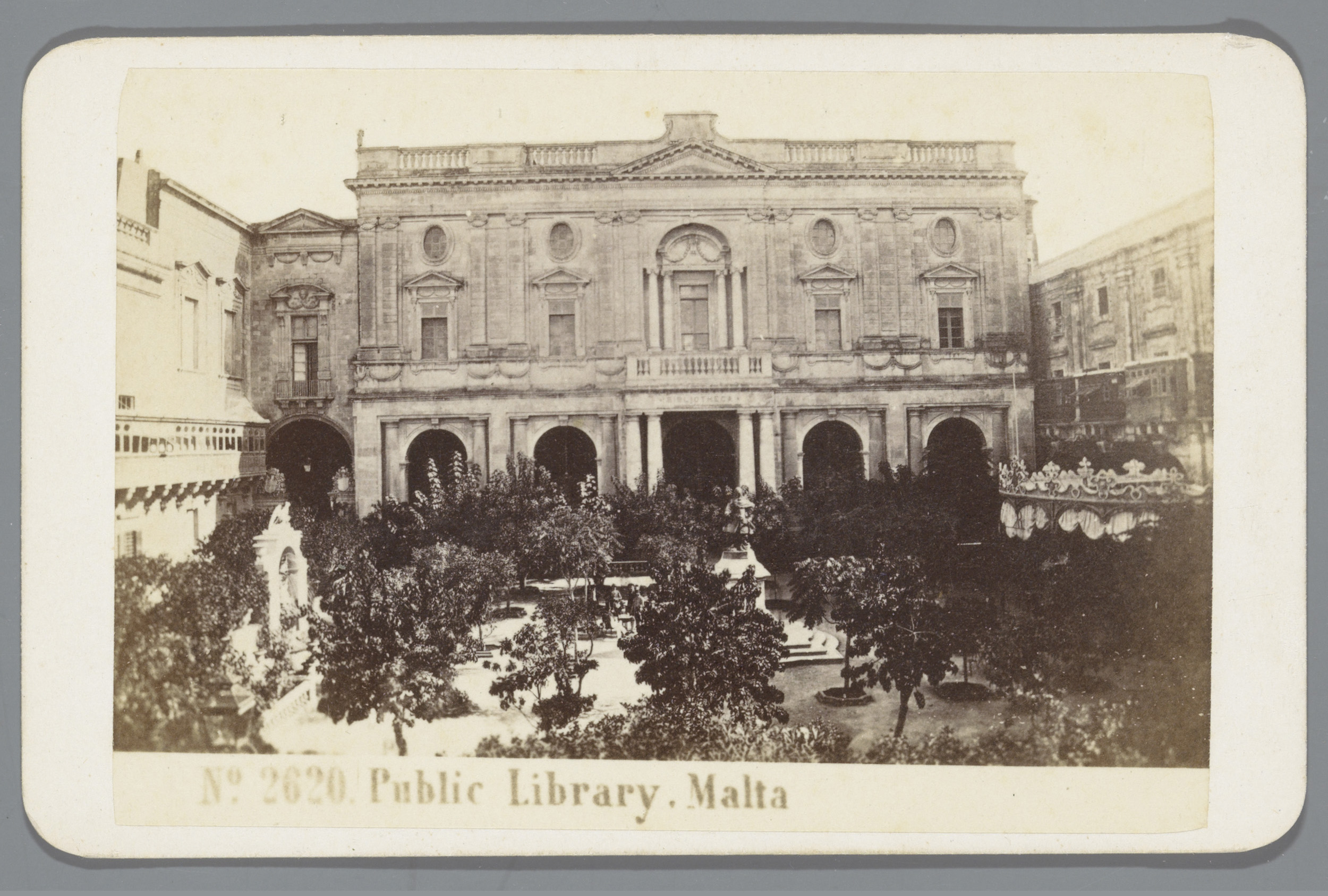 IdentificatieTitel(s): Public Library, MaltaObjecttype: foto carte-de-visite Objectnummer: RP-F-F24781VervaardigingVervaardiger: fotograaf: Giorgio Sommer (vermeld op object)Datering: 1865 - 1890Afmetingen: geheel: h 65 mm × b 103 mmVerwerving en rechtenVerwerving: overdracht van beheer 1994Copyright: Publiek domein